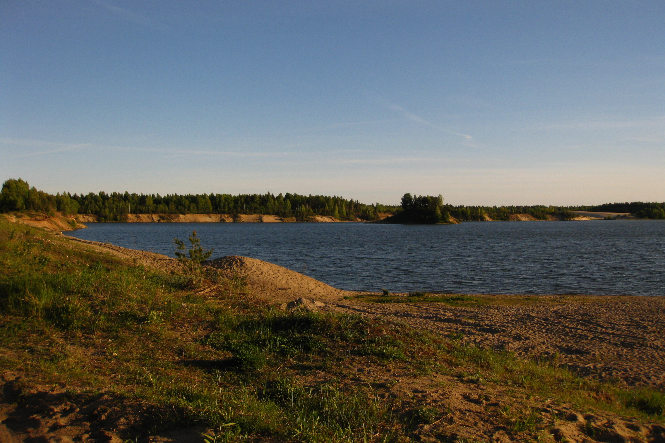 Raku järve idakaldal